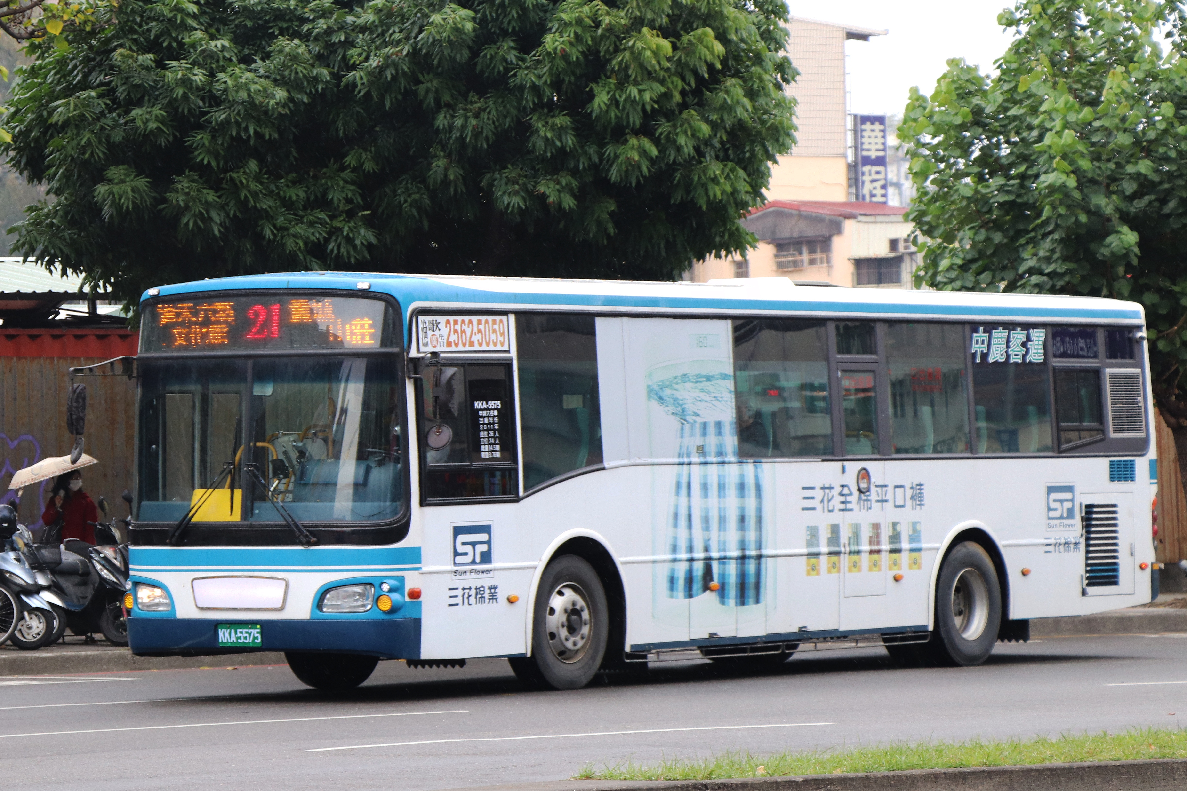 中鹿客運 HINO RK8JRSA大客車 KKA-5575